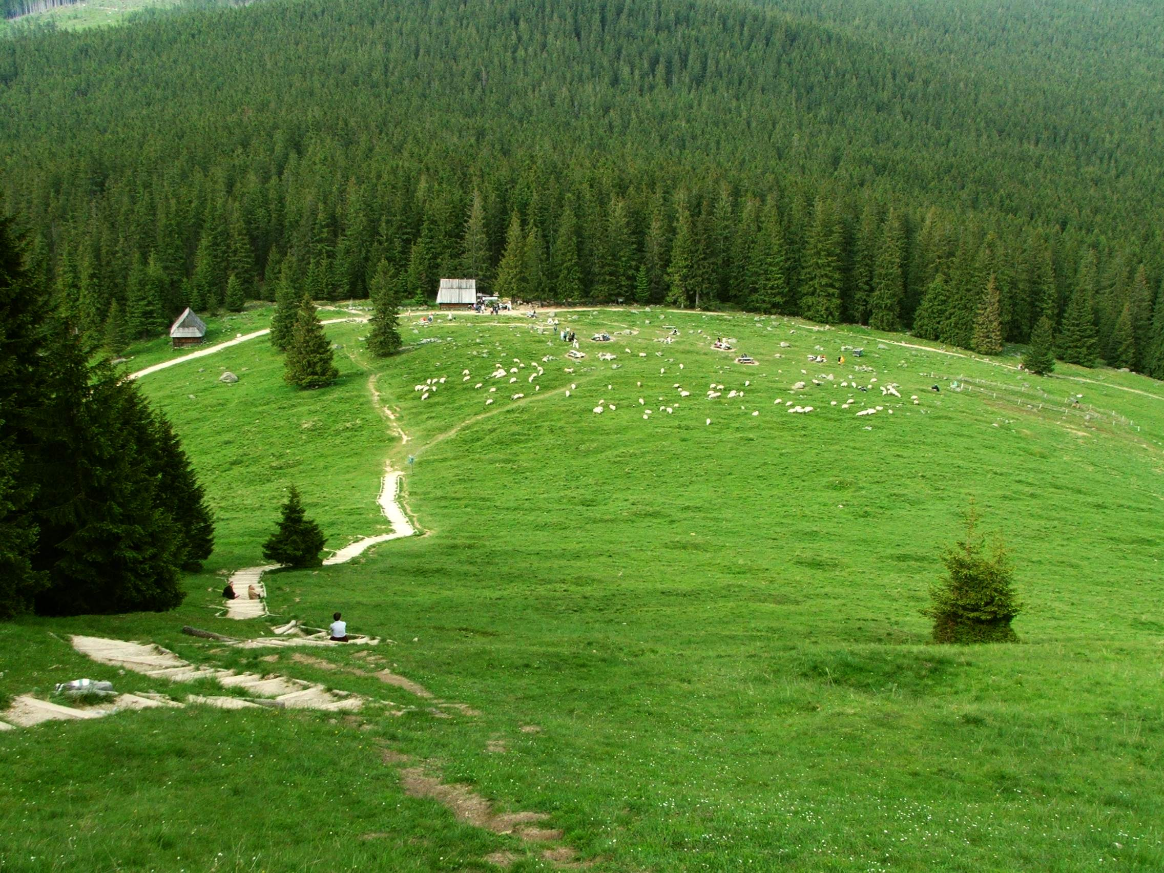 Rusinowa Polana - widok ze ścieżki na Gęsią Szyję